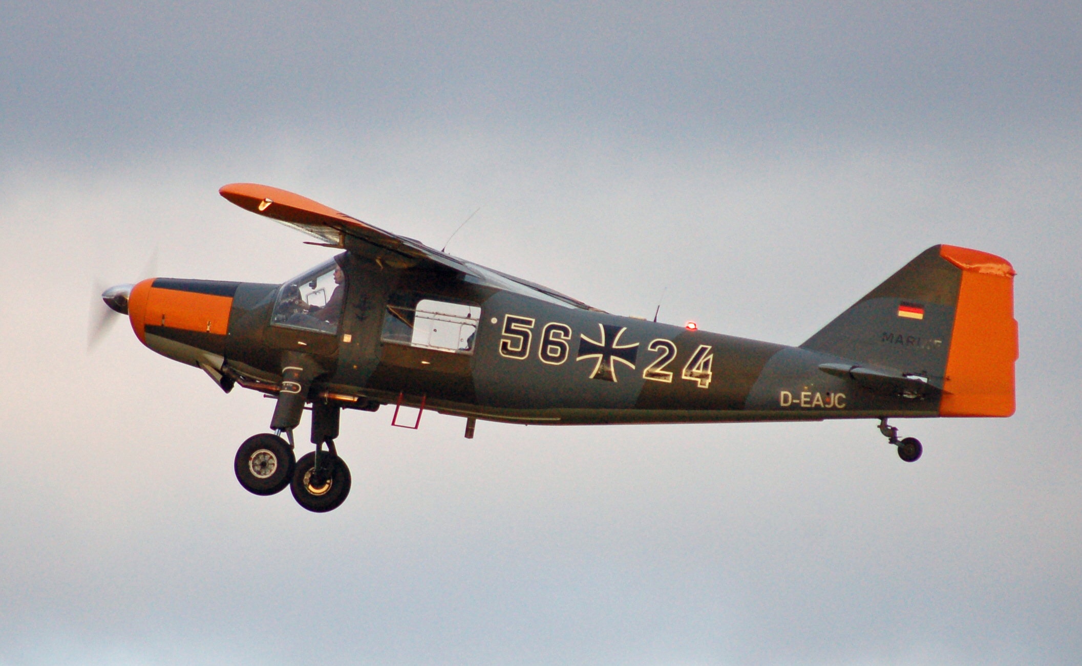 Dornier Do 27 B1 (D-EAJC) über dem Flugplatz Uetersen Baujahr:1958 Länge: 9,60 m Höhe: 3,50 m Spannweite: 12,00 m Reisegeschwindigkeit: 110 KIAS Triebwerk: Lycoming GO-480-B1A6 Leistung: 278 PS / 204,3 kW Propeller: Verstellpropeller max. Abfluggewicht: 1570 kg Reichweite: etwa 500 km